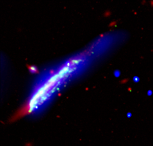 Eine Aufnahme des Chandra X-Ray Observatory